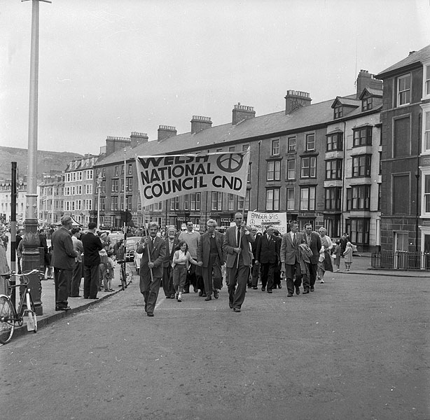 Teitl Cymraeg/Welsh title: Rali CND yn Aberystwyth Ffotograffydd/Photographer: Geoff Charles (1909-2002) Dyddiad/Date: May 25, 1961 Cyfrwng/Medium: Negydd ffilm / Film negative Cyfeiriad/Reference: (gch23947) Rhif cofnod / Record no.: 3470942 Rhagor o wybodaeth am gasgliad Geoff Charles yn Llyfrgell Genedlaethol Cymru More information about the Geoff Charles Collection at the National Library of Wales